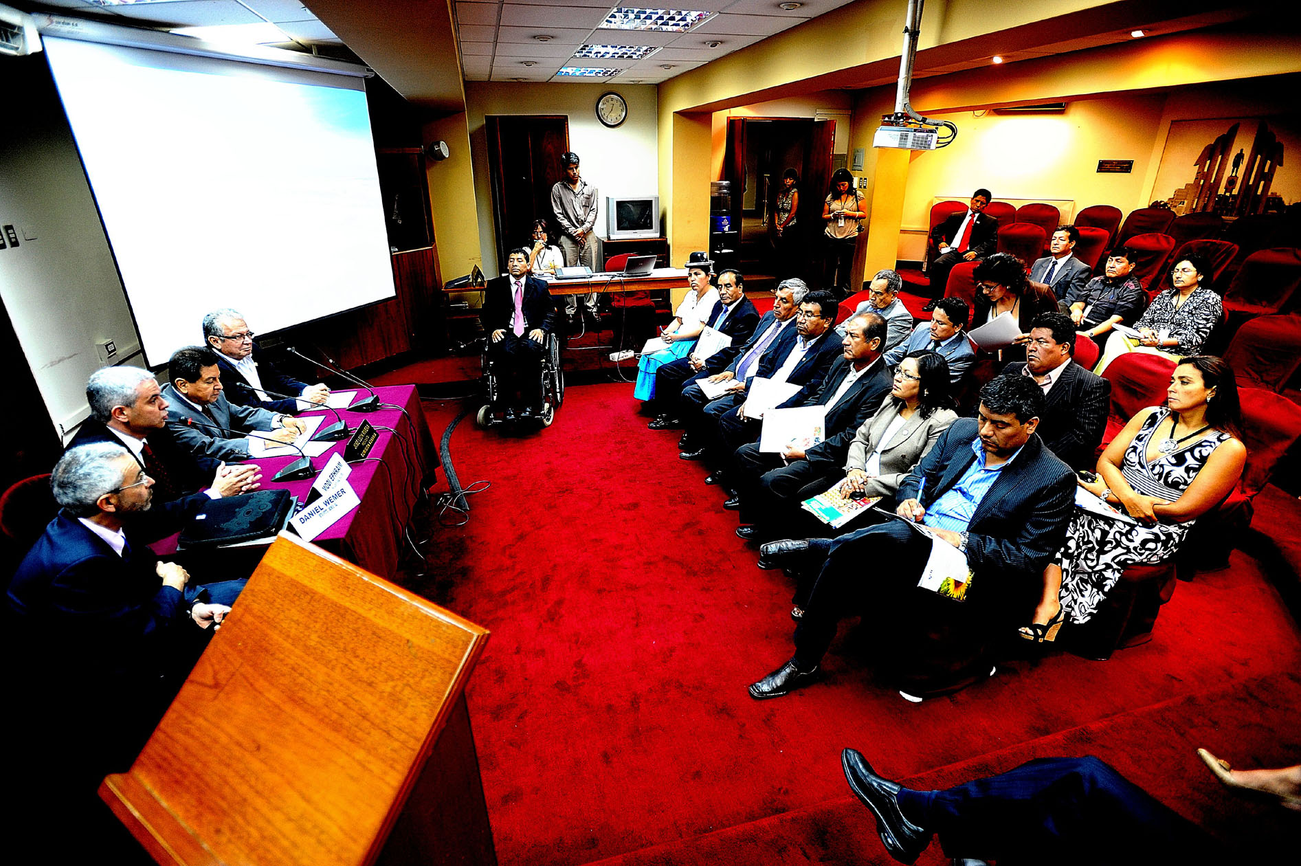 Legisladores miembros de la Comisión Agraria, presididos por el congresista José León Rivera, sostuvieron hoy una reunión de trabajo con funcionarios del Ministerio de Agricultura de Israel. La comitiva visitante estuvo presidida por el embajador de Israel en el Perú, Modi Ephraim.